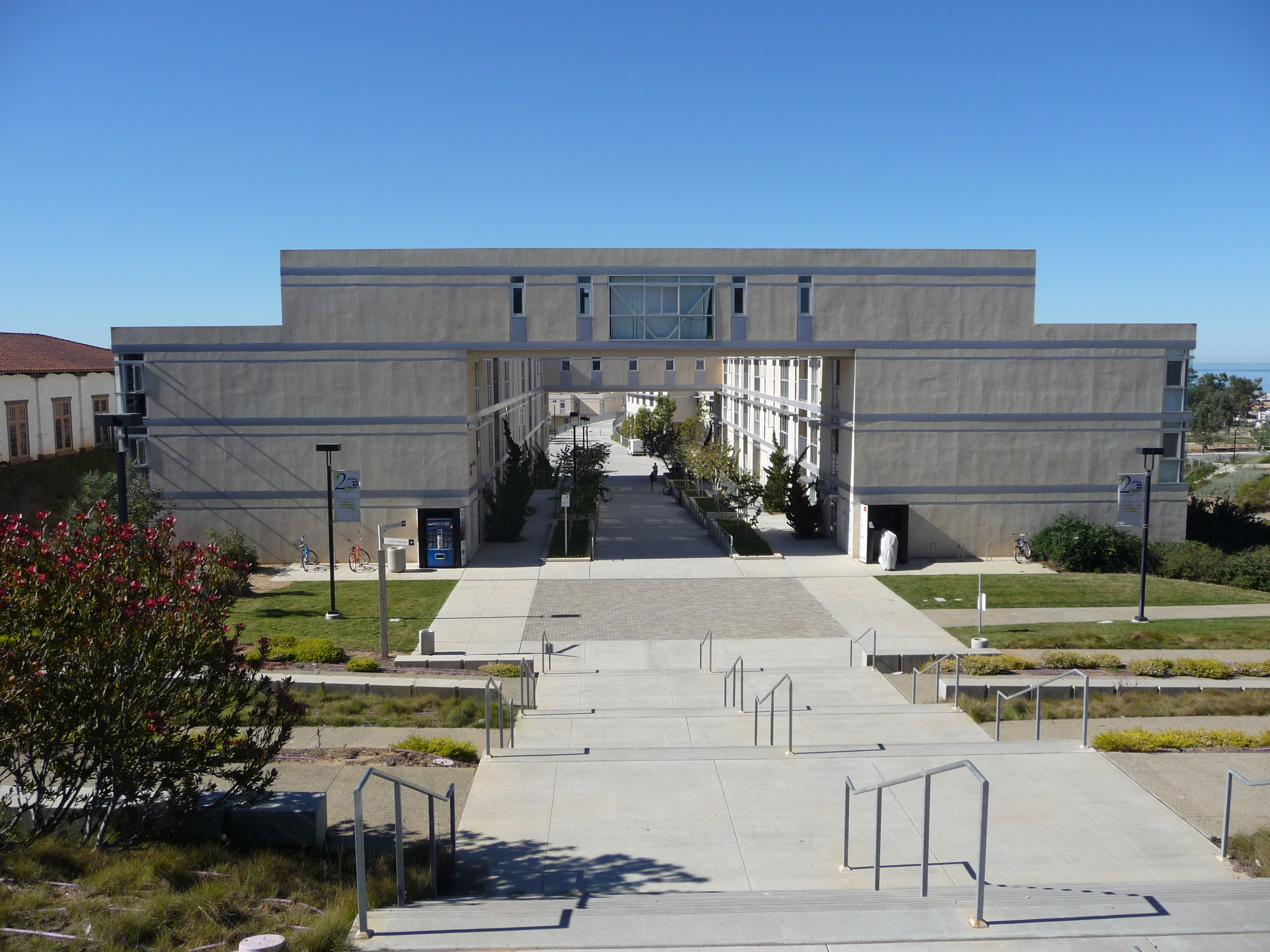 Mesa Verde Hall in Roosevelt College at UCSD.